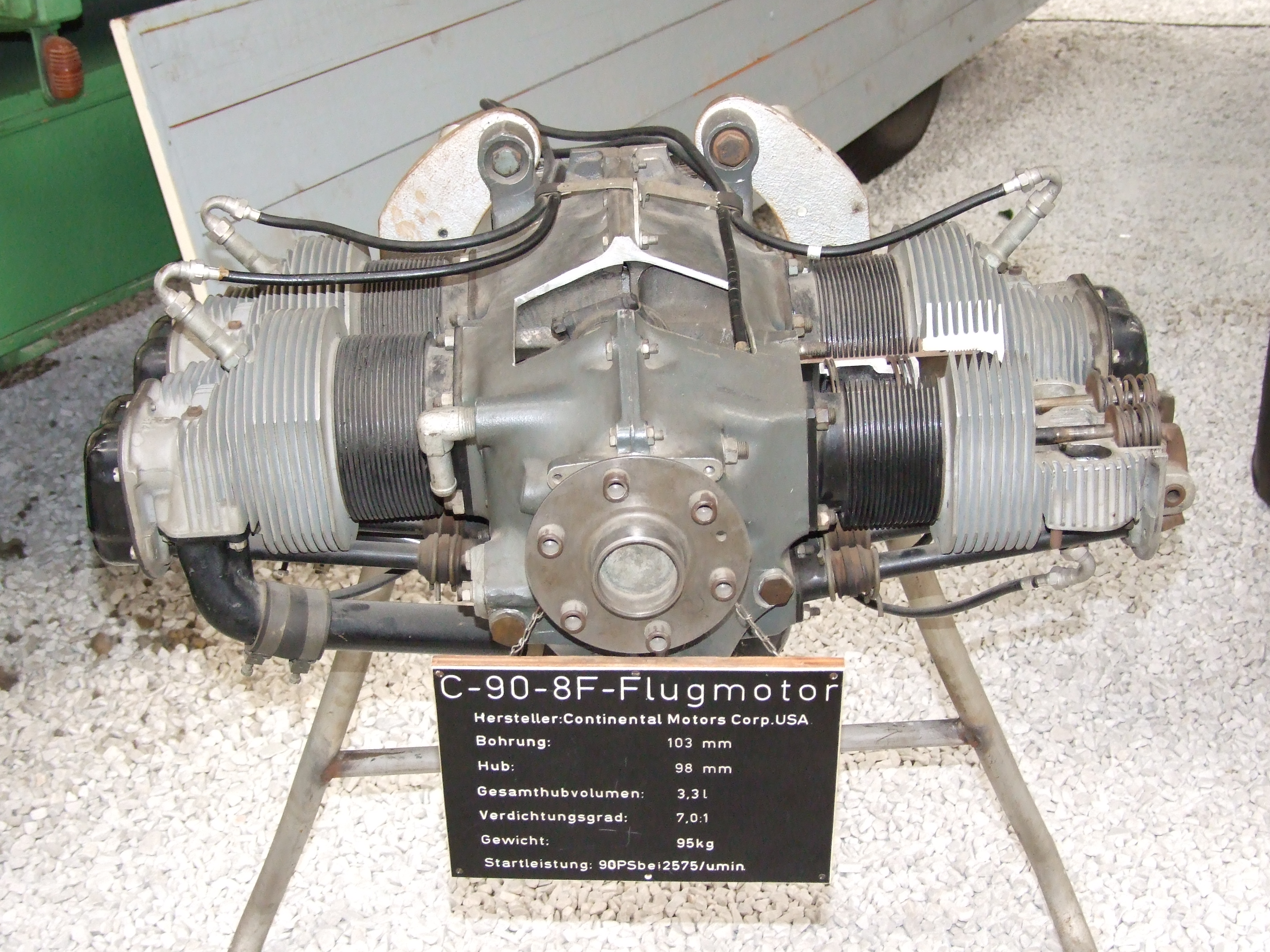 Continental Motors C-90-8F aircraft engine in Technik Museum Speyer